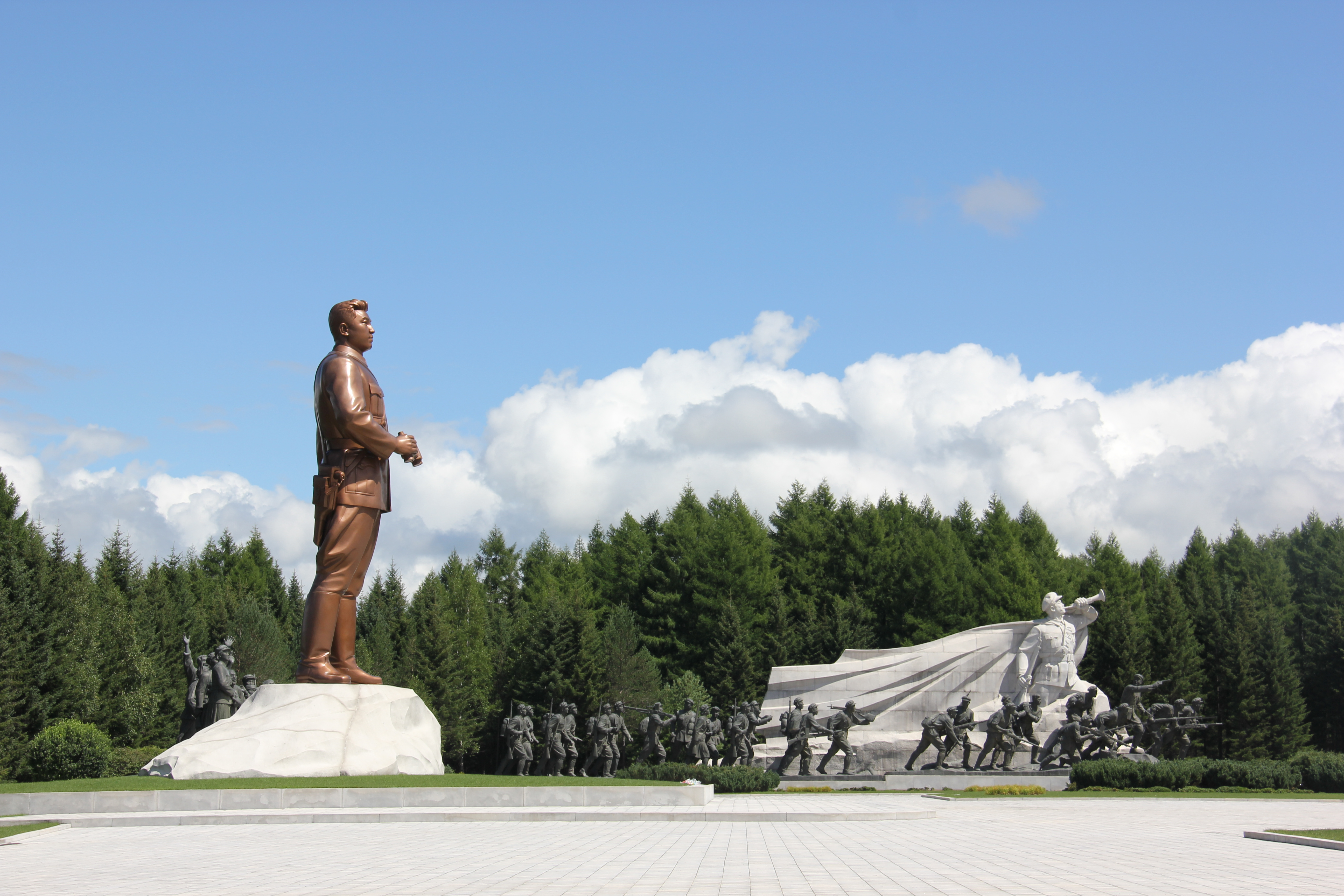 Samjiyon Grand Monument